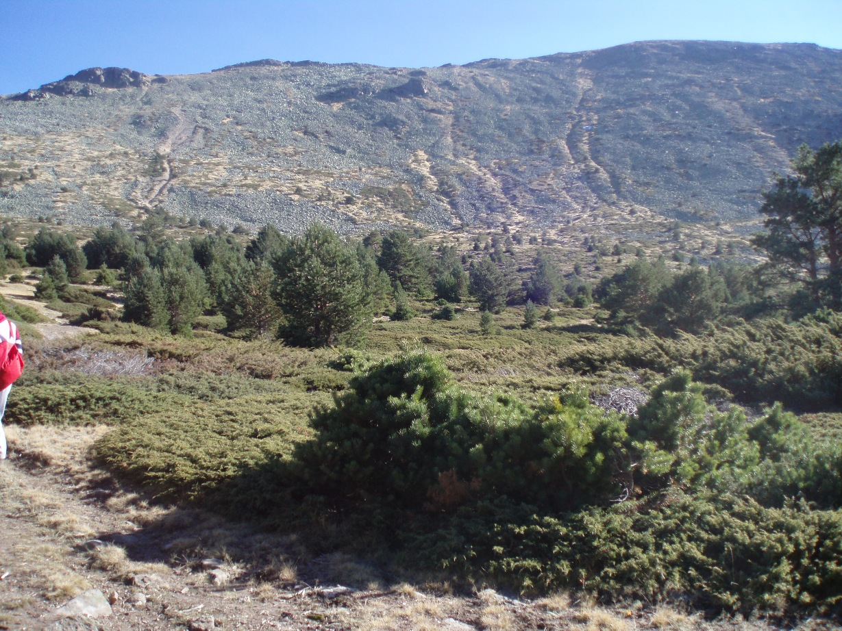 Vista de la vertiente noroeste del pico de Peñalara, la cara que está en la provincia de Segovia (España). La fotografía fue tomada en una zona ubicada a más de 1.800 metros de altura, en un lugar donde hay un bosque de pino silvestre bastante disperso. Los ejemplares presentes en la zona son también bastante bajos debido a los vientos fuertes que soplan a esa altura. En la imagen se aprecia cómo el bosque se va clareando a medida que se gana altura, dejando paso a los matorrales de alta montaña y a los pedregales. Así mismo, la pendiente se acentúa según se asciende. La fotografía fue tomada el 19 de noviembre de 2007, el último día de dicho año en que esta zona estuvo sin nieve. La cima de Peñalara está en la parte derecha de la cornisa que se aprecia, y el Risco de los Claveles en el lado izquierdo.